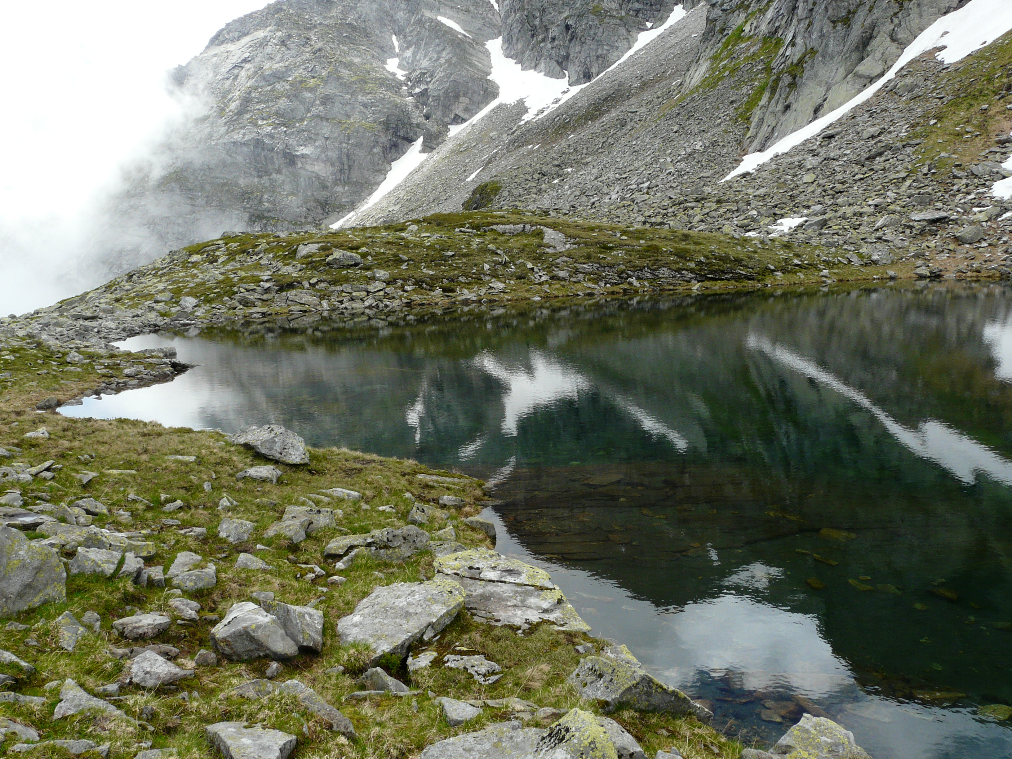 Rifflersee oberhalb der (verfallenen) Rifflerhütte